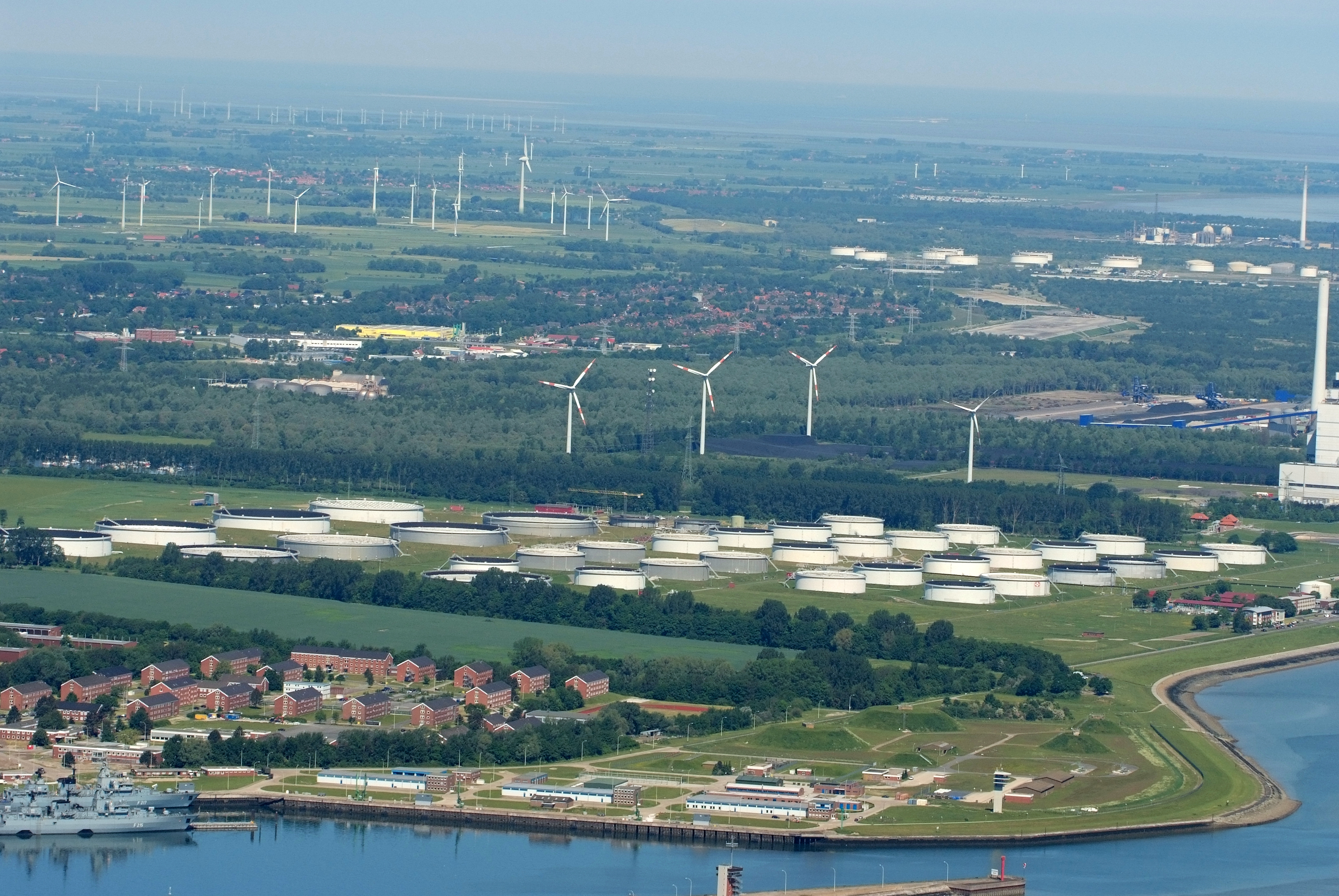 Fotoflug vom Flugplatz Nordholz-Spieka über Cuxhaven und Wilhelmshaven